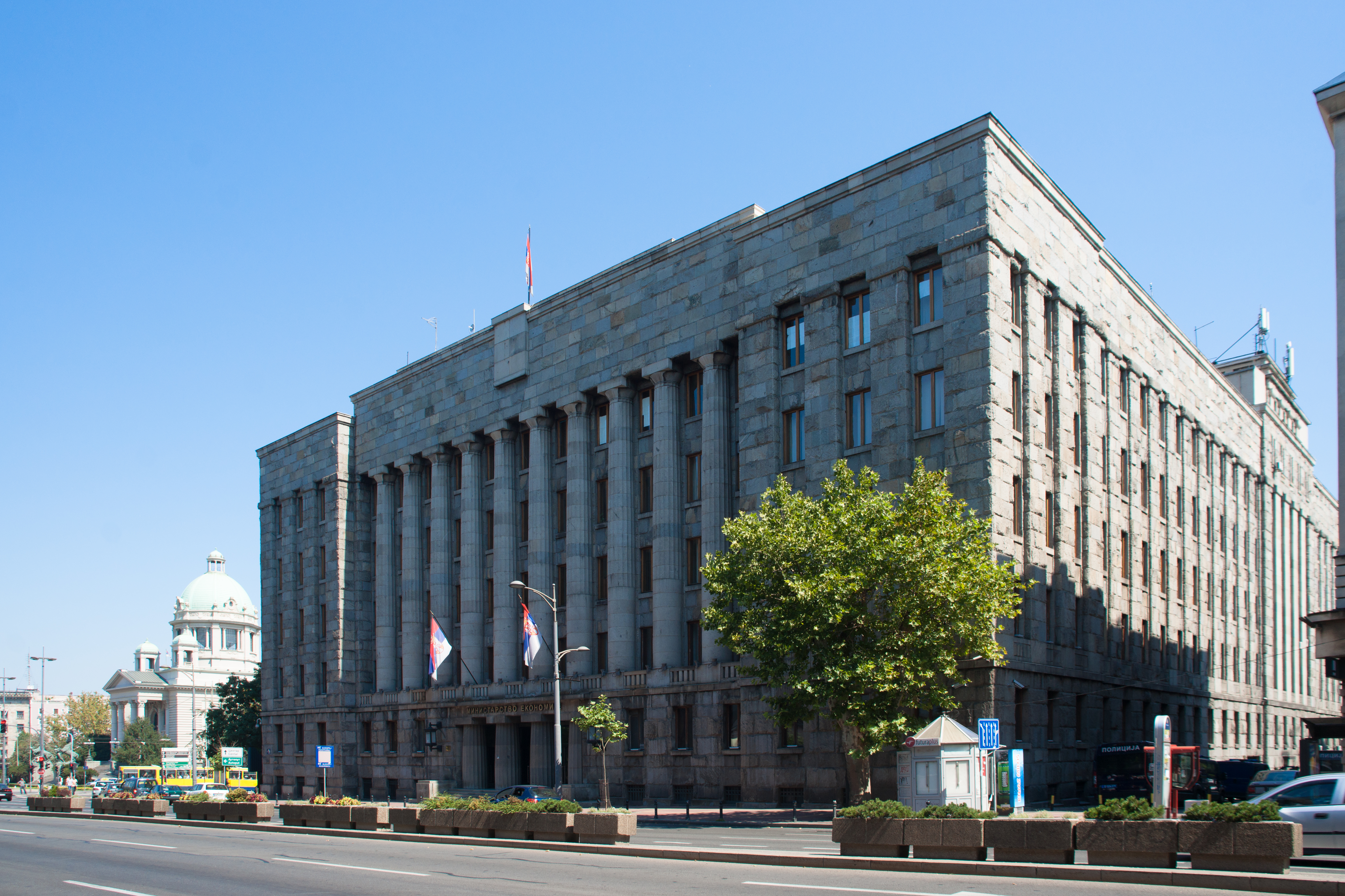 Minister of the economy - Belgrade